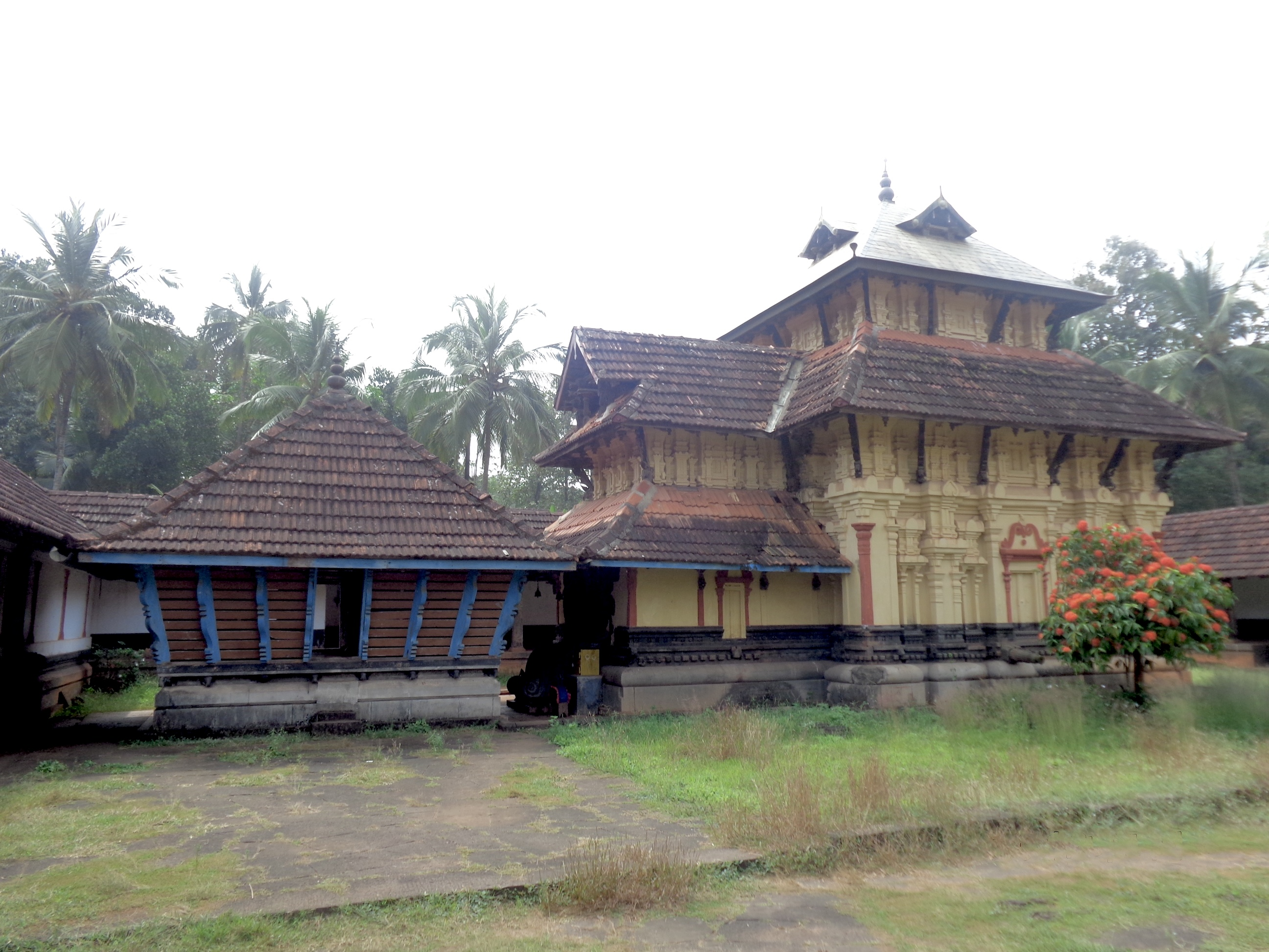 karikkkad subrahmanya temple- balasubrahmanya sreekovil